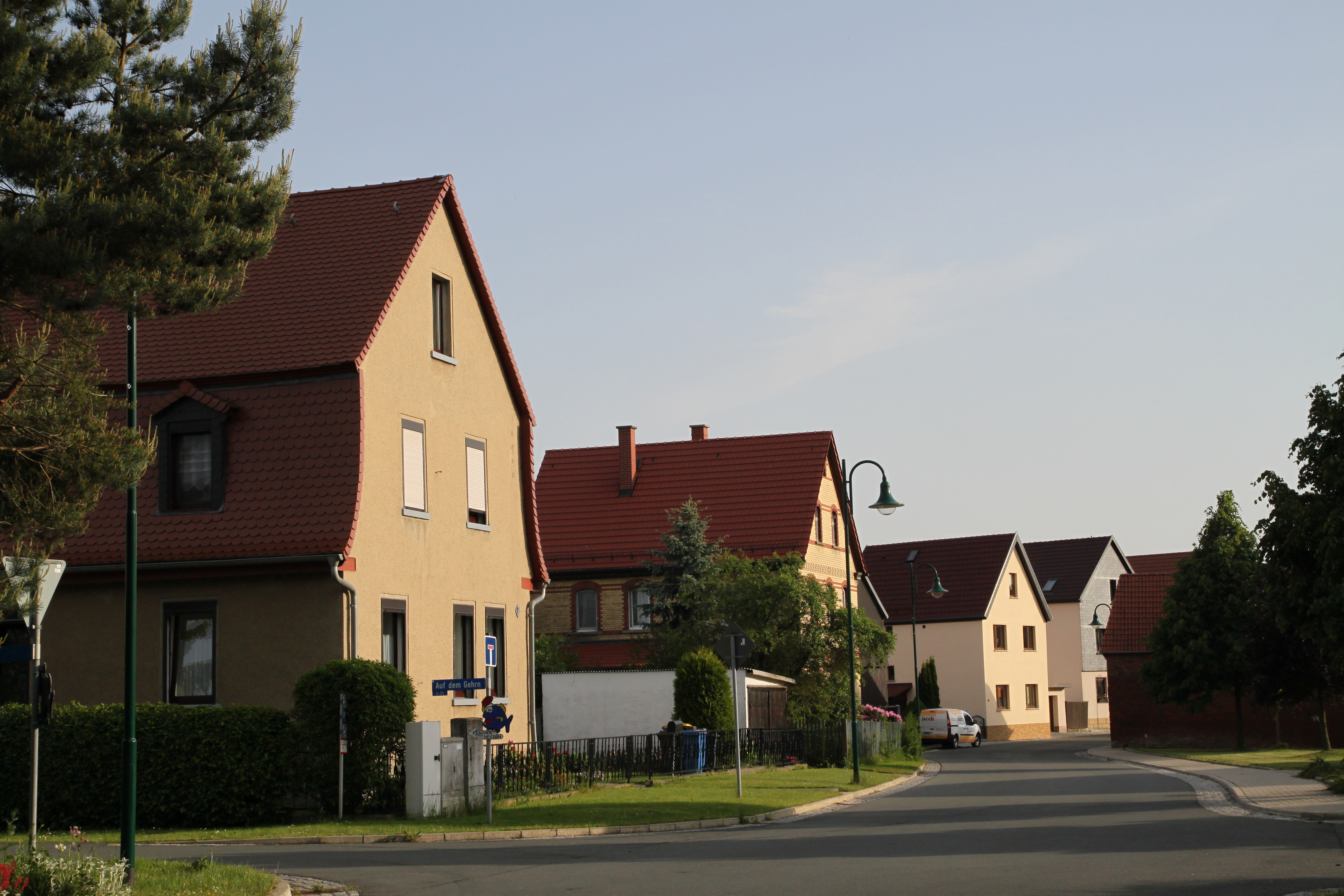 Waldeck